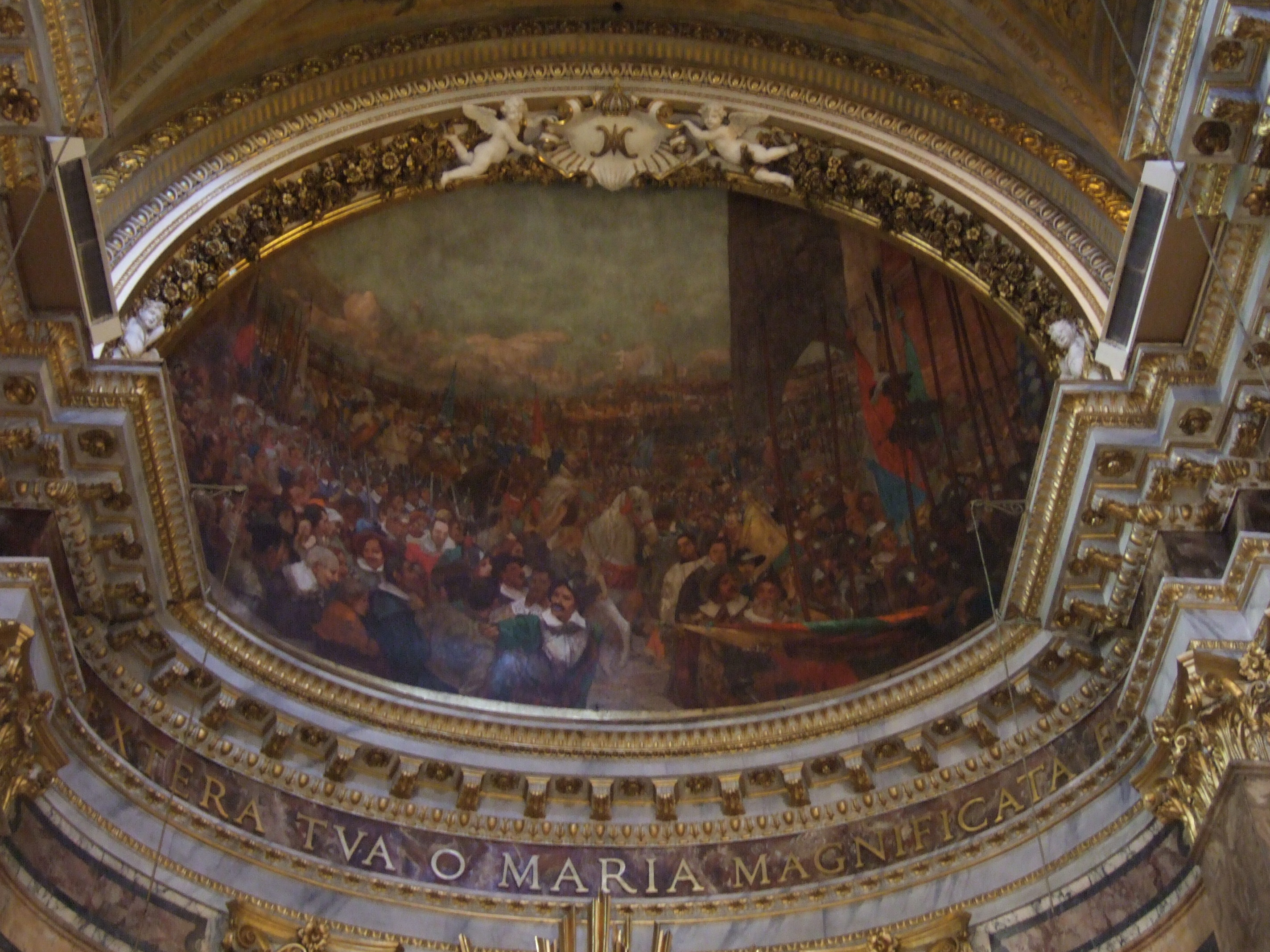 Deckenfresko in der Apsis der Kirche Santa Maria della Vittoria in Rom. Dargestellt ist der Einzug des wundersamen Marienbildes in Prag nach der für die Katholiken siegreichen Schlacht am Weißen Berg 1620.